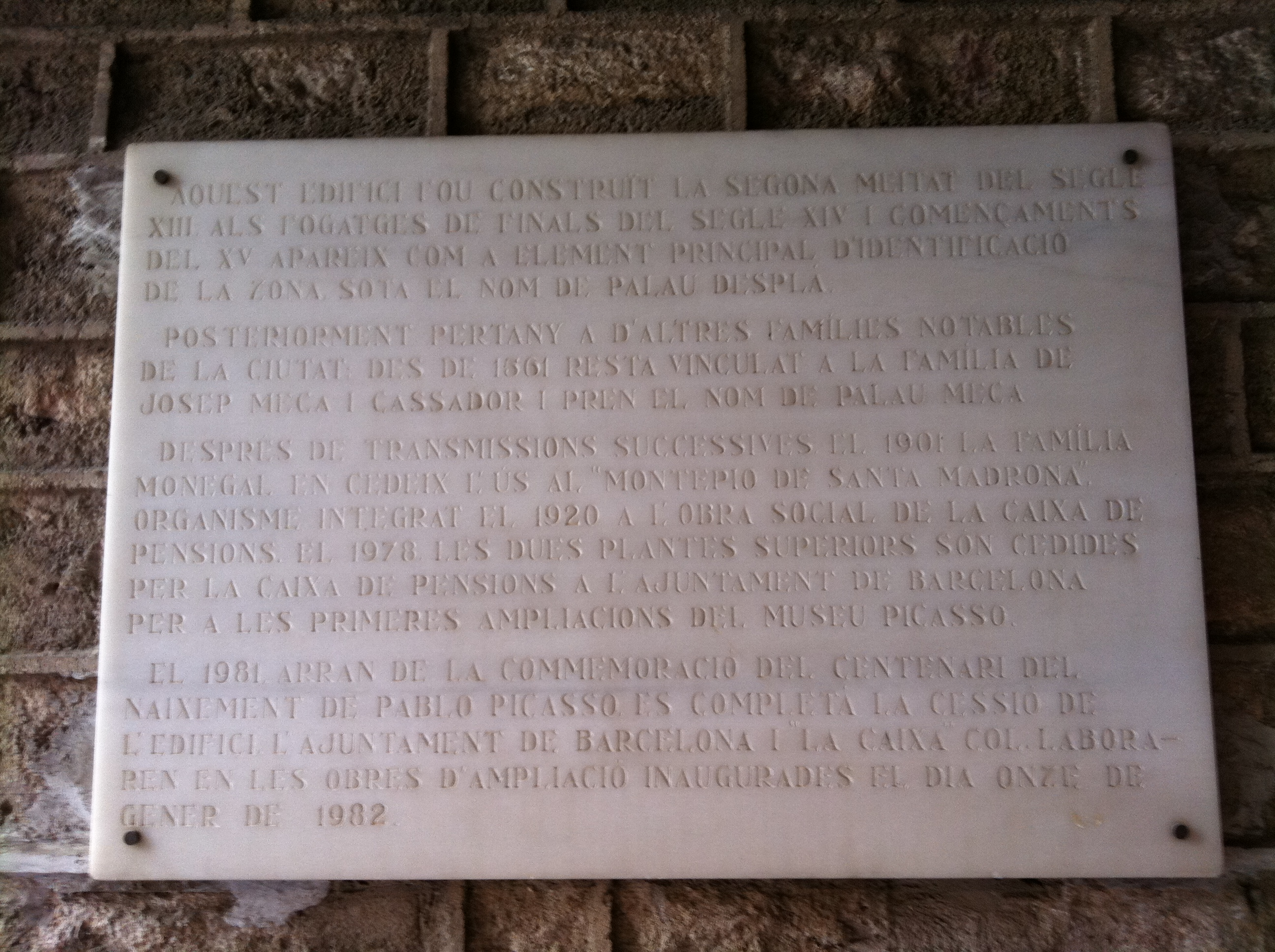 Placa inauguració Palau Meca (Barcelona) 1982